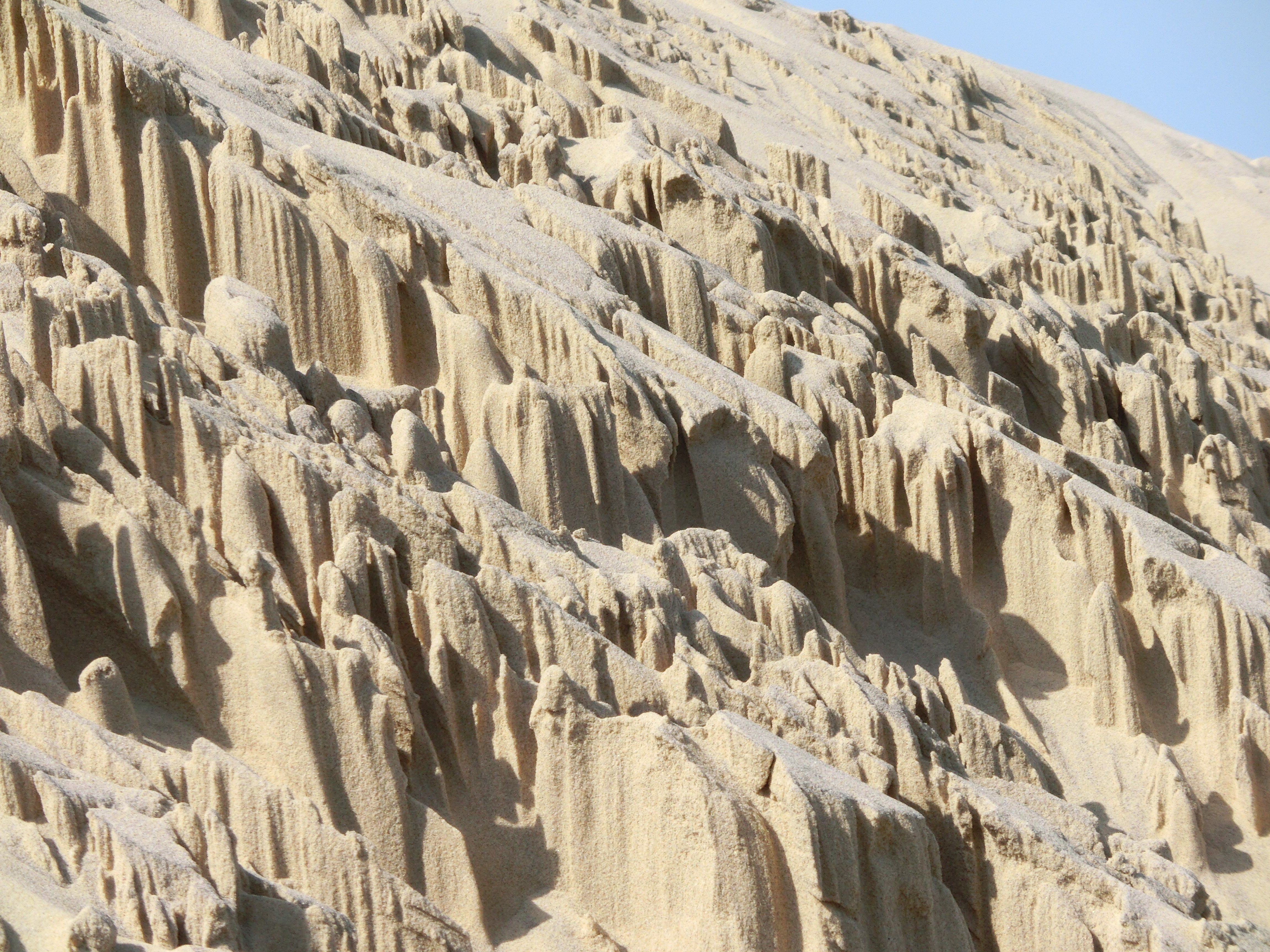 Constructions de sable de la dune du Pilat.